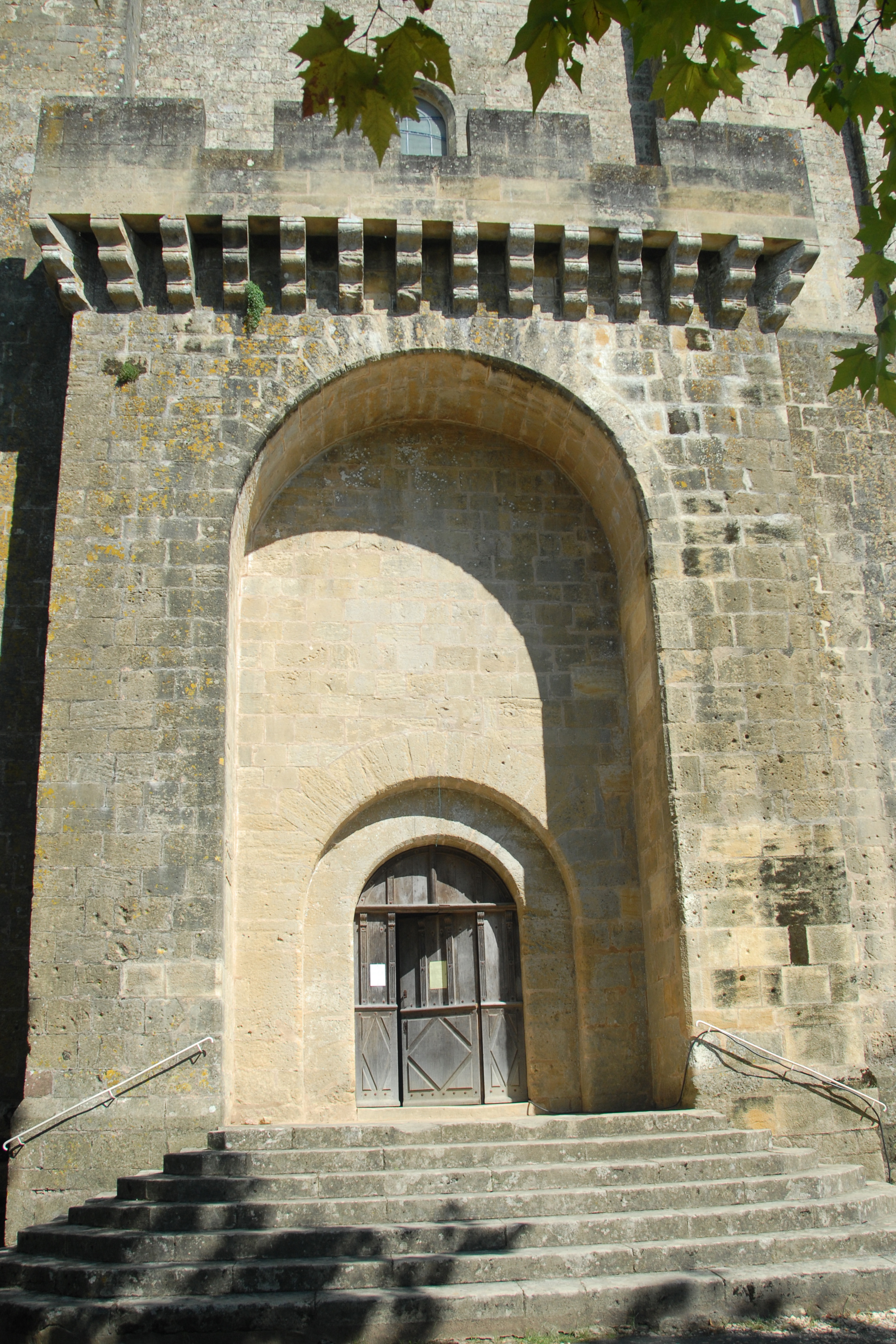 St.-Avit-Sénieur, Nathex mit Hauptportal, Empore mit Maschikulis